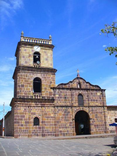 foto tomada en la iglesia de galan